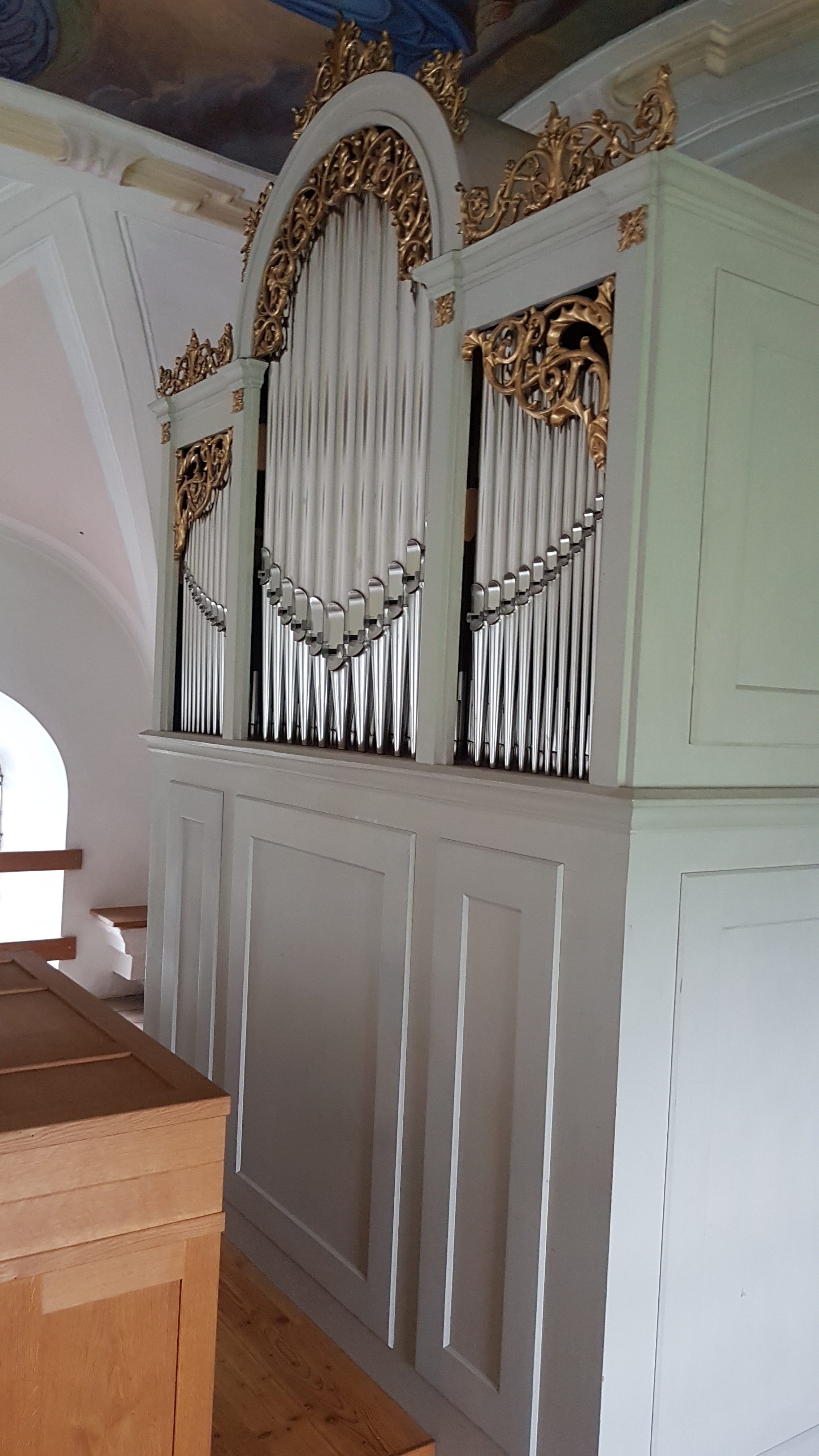 Mariä Heimsuchung (Mühlberg, Waging am See)